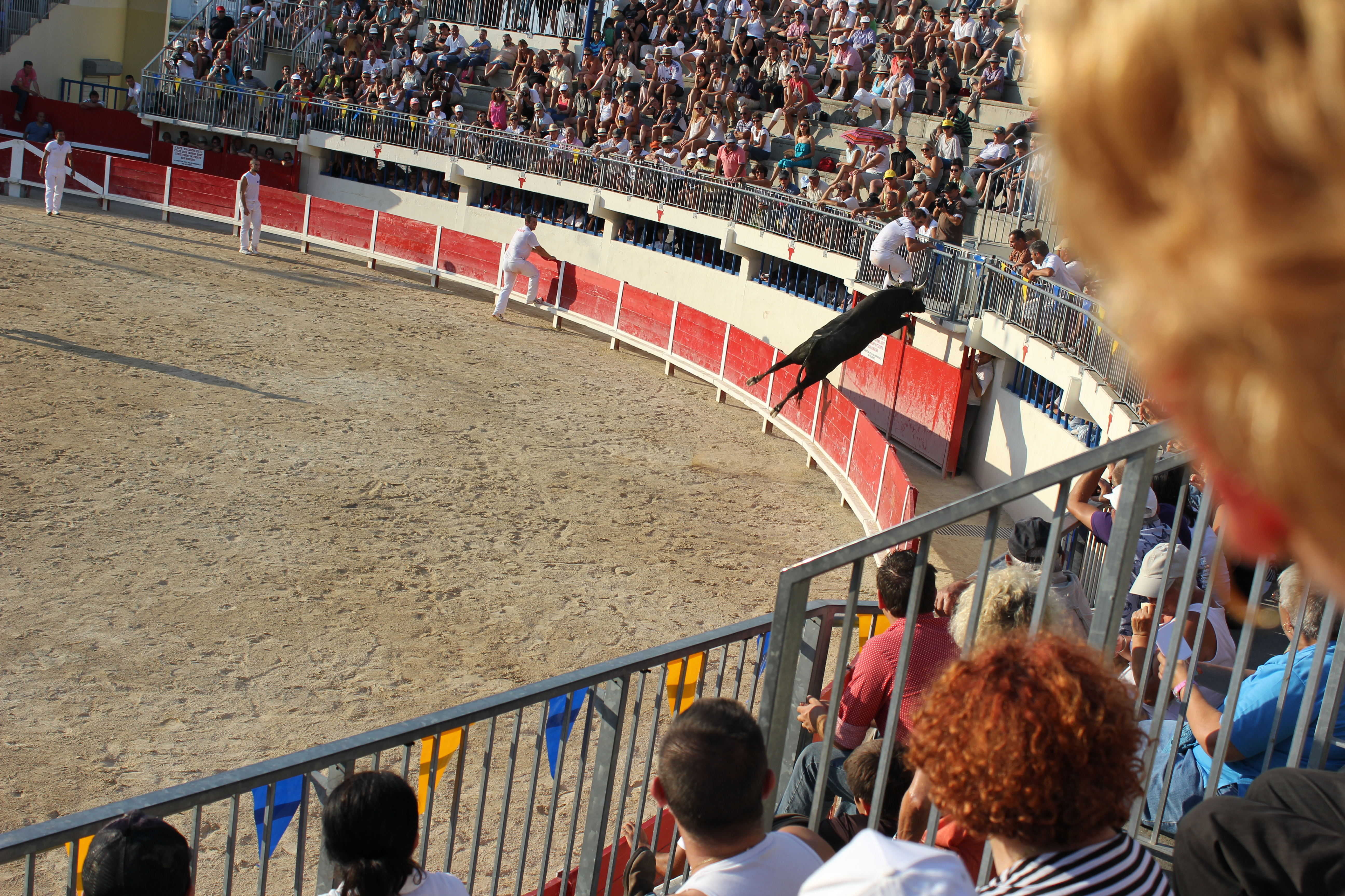 hevige stier die niet stopt aan de balustrade maar mee de hoogte ingaat